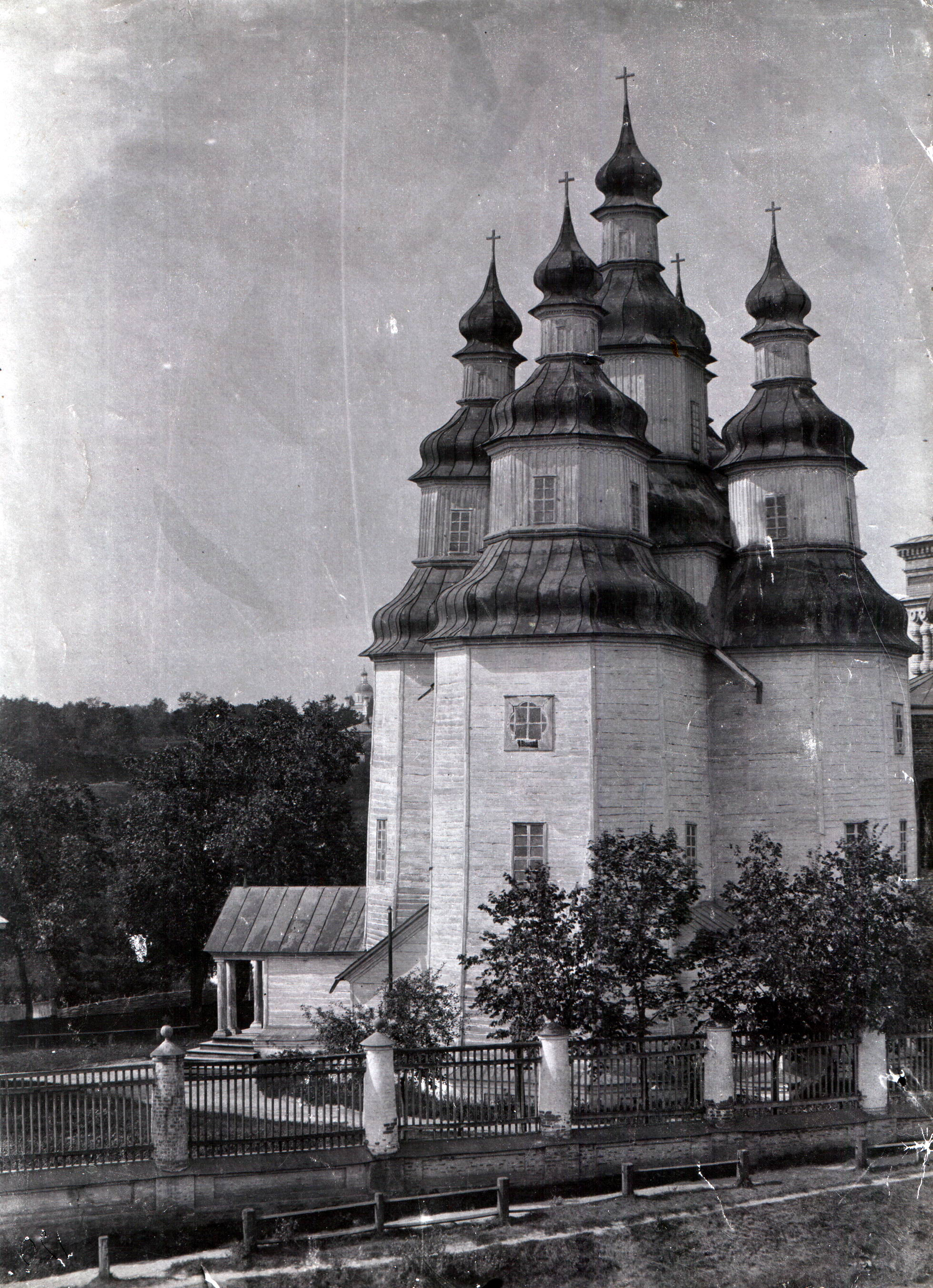 Україна. Сумська обл., м. Ромни. Стара Покровська церква, знімок зроблений незадовго до її перевезення в Полтаву (де вона у Велику Вітчизняну й згоріла). На задньому плані стіна нової Покровської церкви